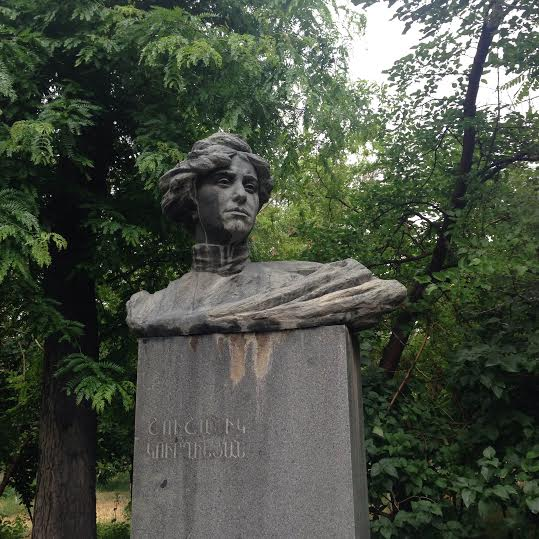 Շուշանիկ Կուրղինյանի հուշարձանը 11/6